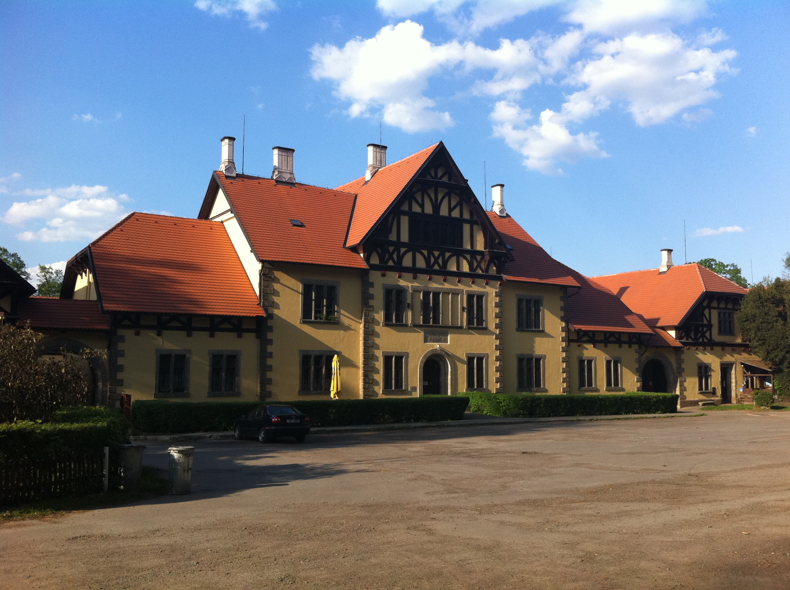 Hřebčín ve Slatiňanech